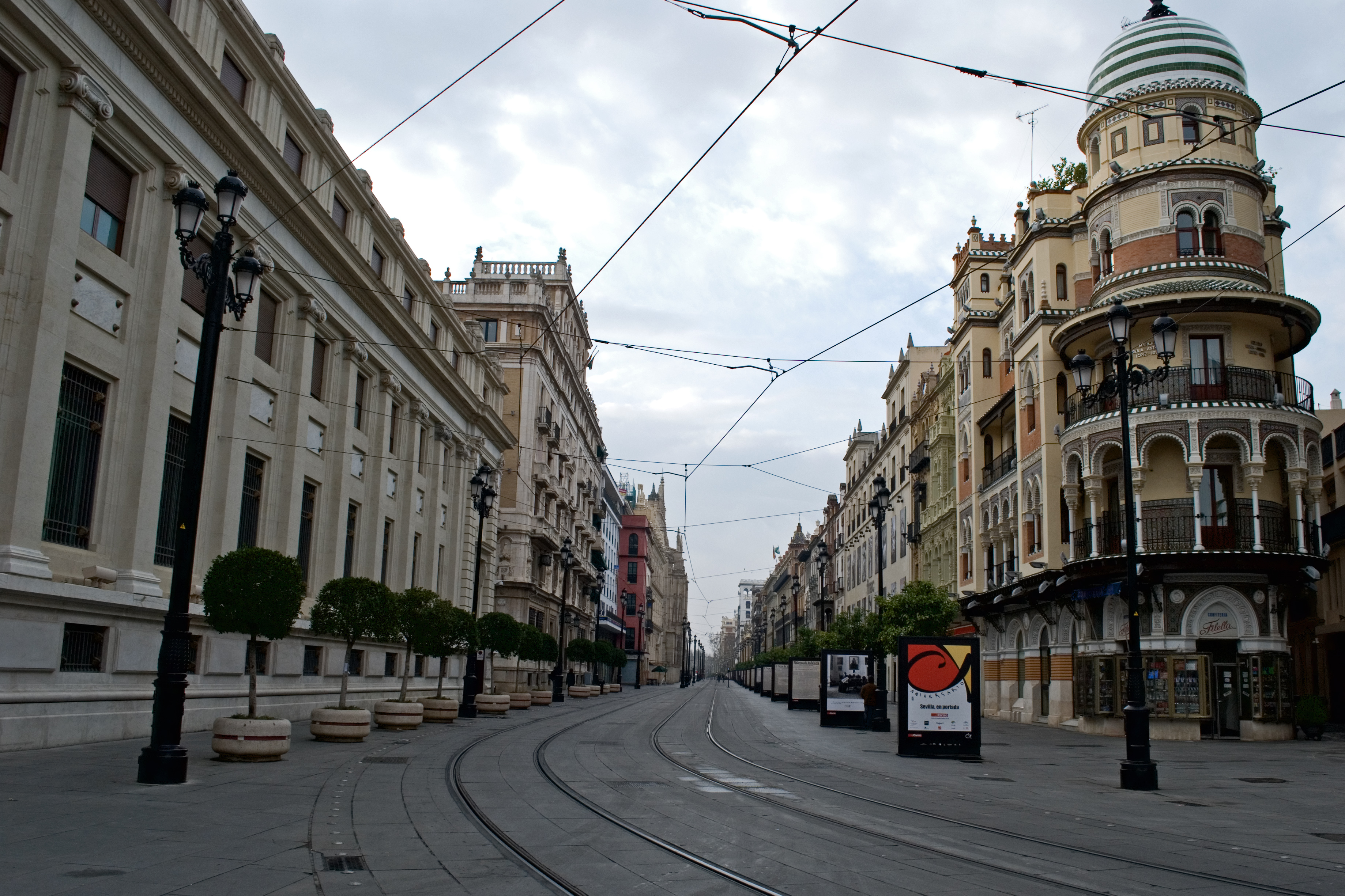 Vista general de la Avenida de la Constitución de Sevilla